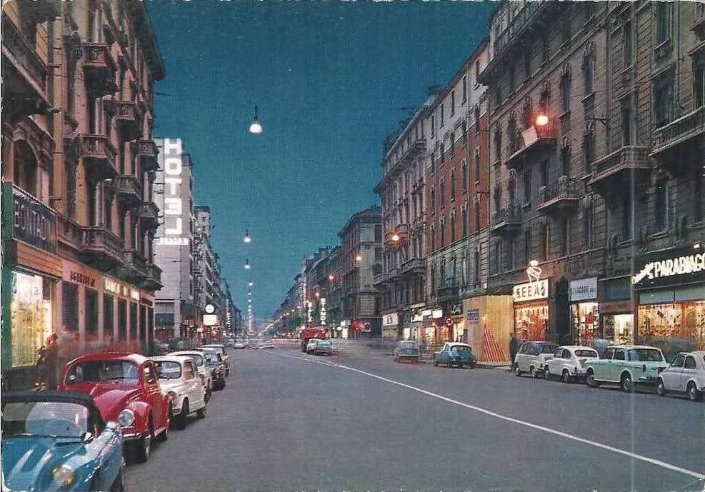 Milano, corso Buenos Aires.